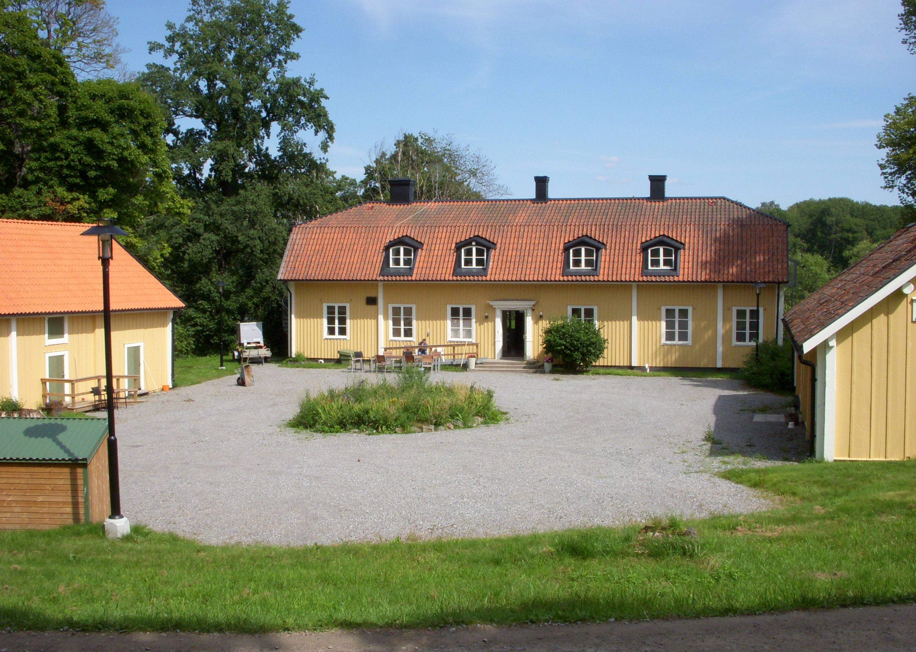 Gården Lindhov vid Aspen